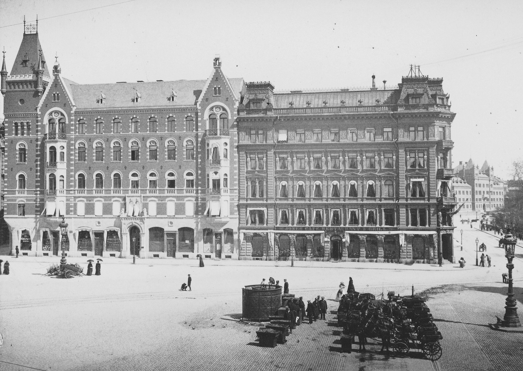 Norrmalmstorg 2-4 med Jones Café, Restaurant och Grill i nummer 4